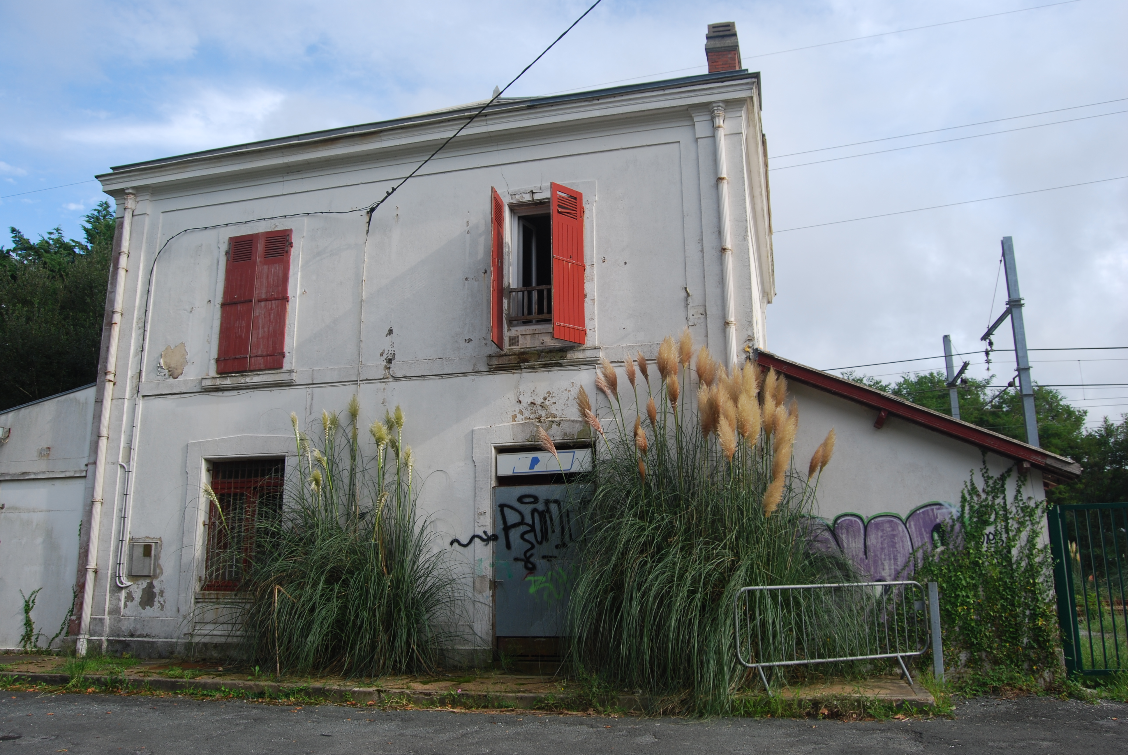 Gare de Bidart à l'abandon, à l'été 2014.